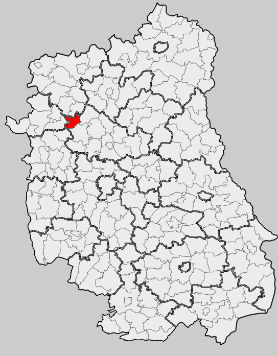 Map of gmina Jeziorzany, Lubartów county, Lublin voivodship Mapa gminy Jeziorzany, powiat lubartowski, województwo lubelskie